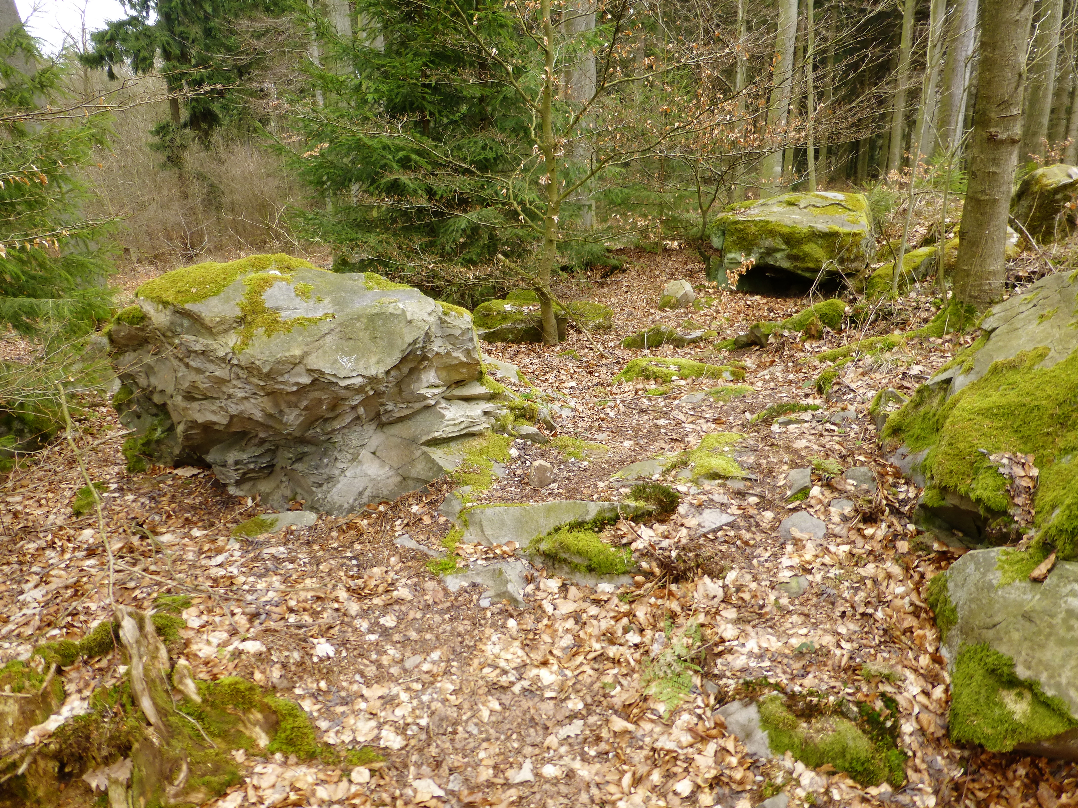 Steinzeitliche Quarzitschlagstelle am Voßküppel bei Bühren, Landkreis Göttingen, Südniedersachsen